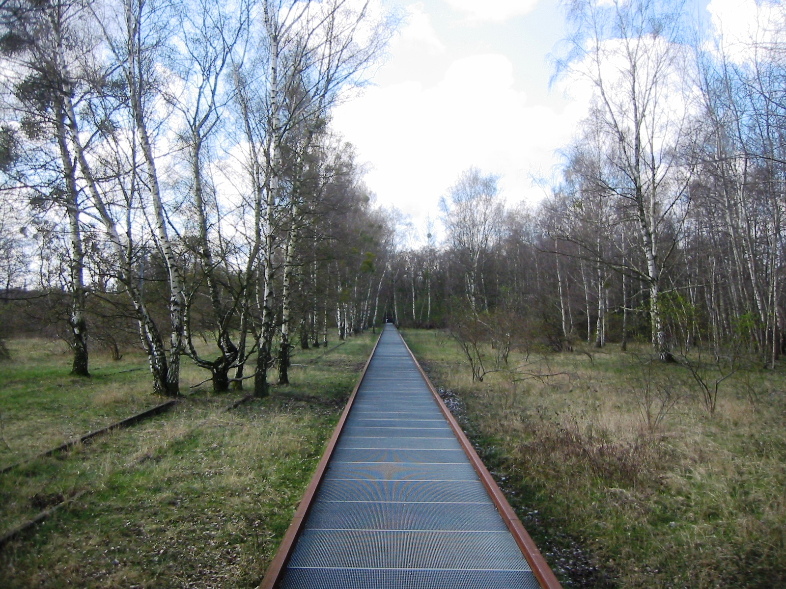 Naturschutzgebiet im nördlichen Teil im Natur-Park Schöneberger Südgelände in Berlin-Schöneberg. Damit die Tiere und Pflanzen sich ungestört ausbreiten können, wurde der Weg auf Röhren aufgebaut, die sich wiederum auf den Schienen des ehemaligen Bahnhofs befinden. Somit durchschneidet der Weg nicht das Naturschutzgebiet